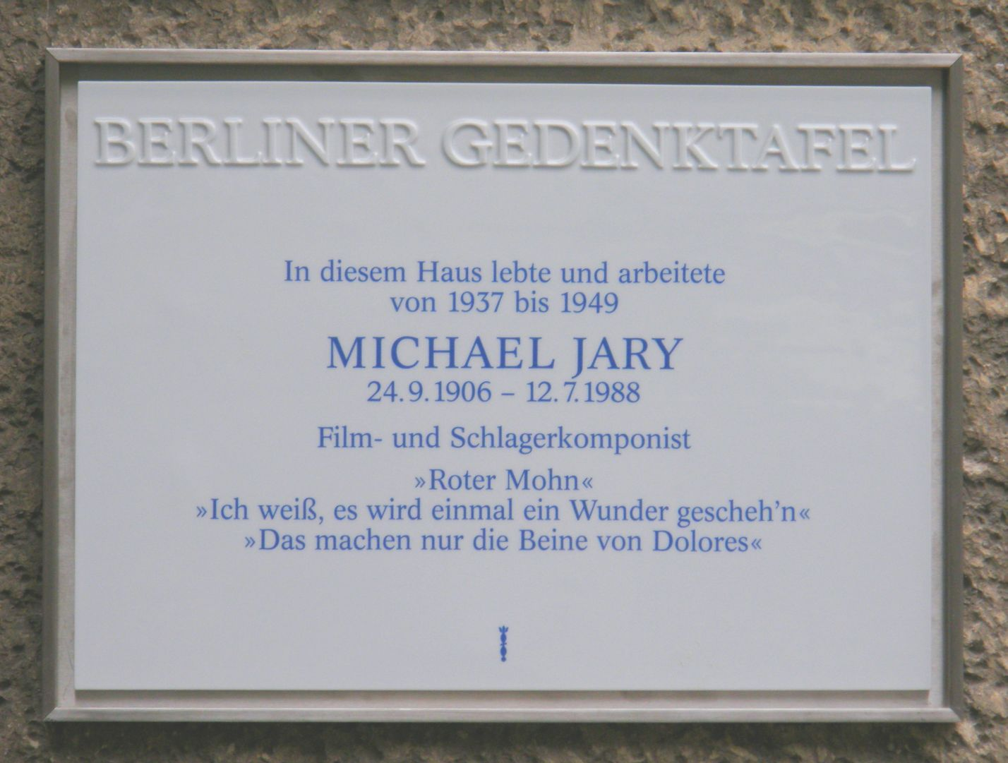 Berliner Gedenktafel für Michael Jary. Fasanenstraße 60, Berlin-Wilmersdorf. Enthüllt am 21. Mai 2008.